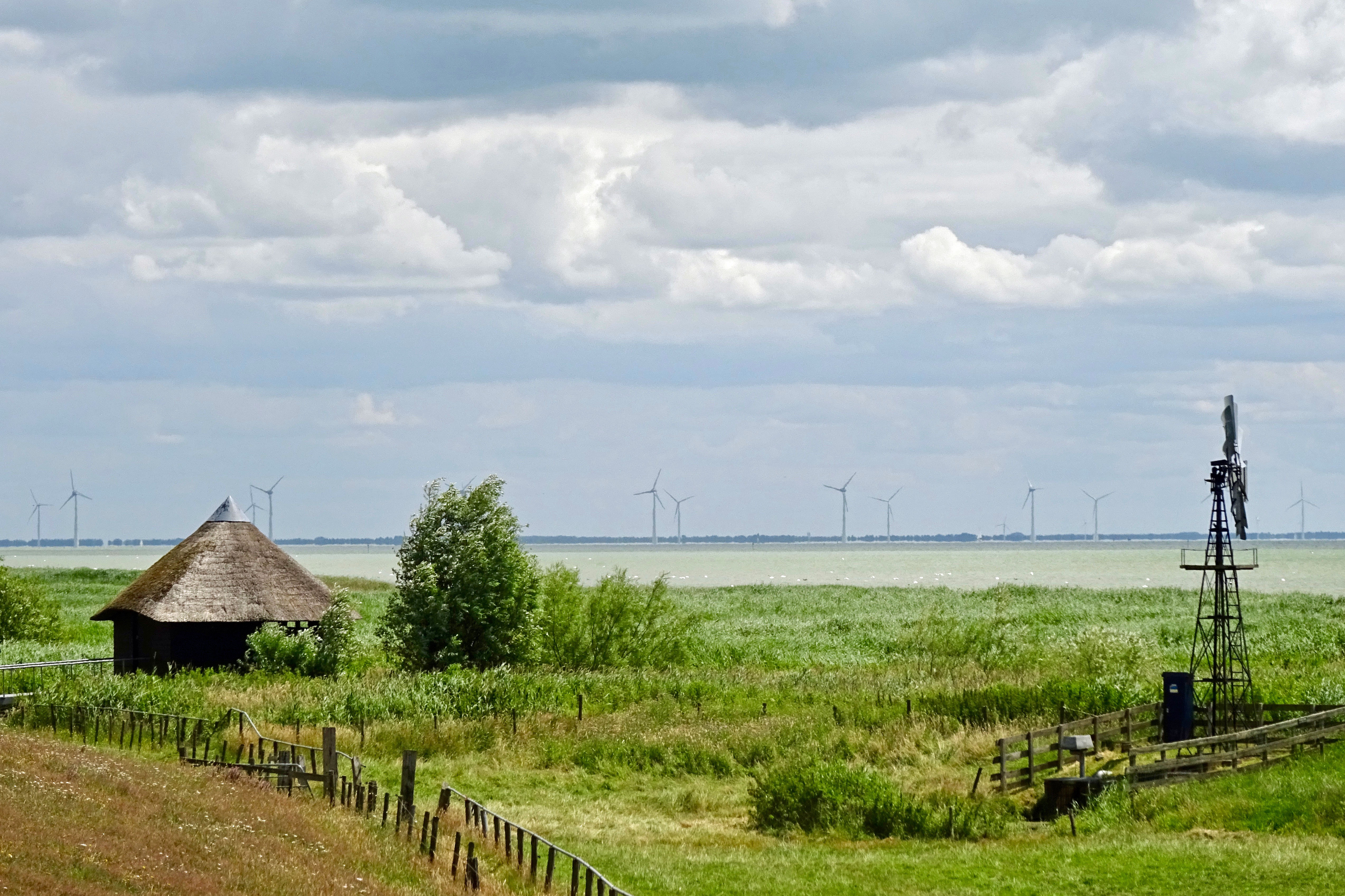 Vogelhut "De Mok" tussen Mirns en Laaxum